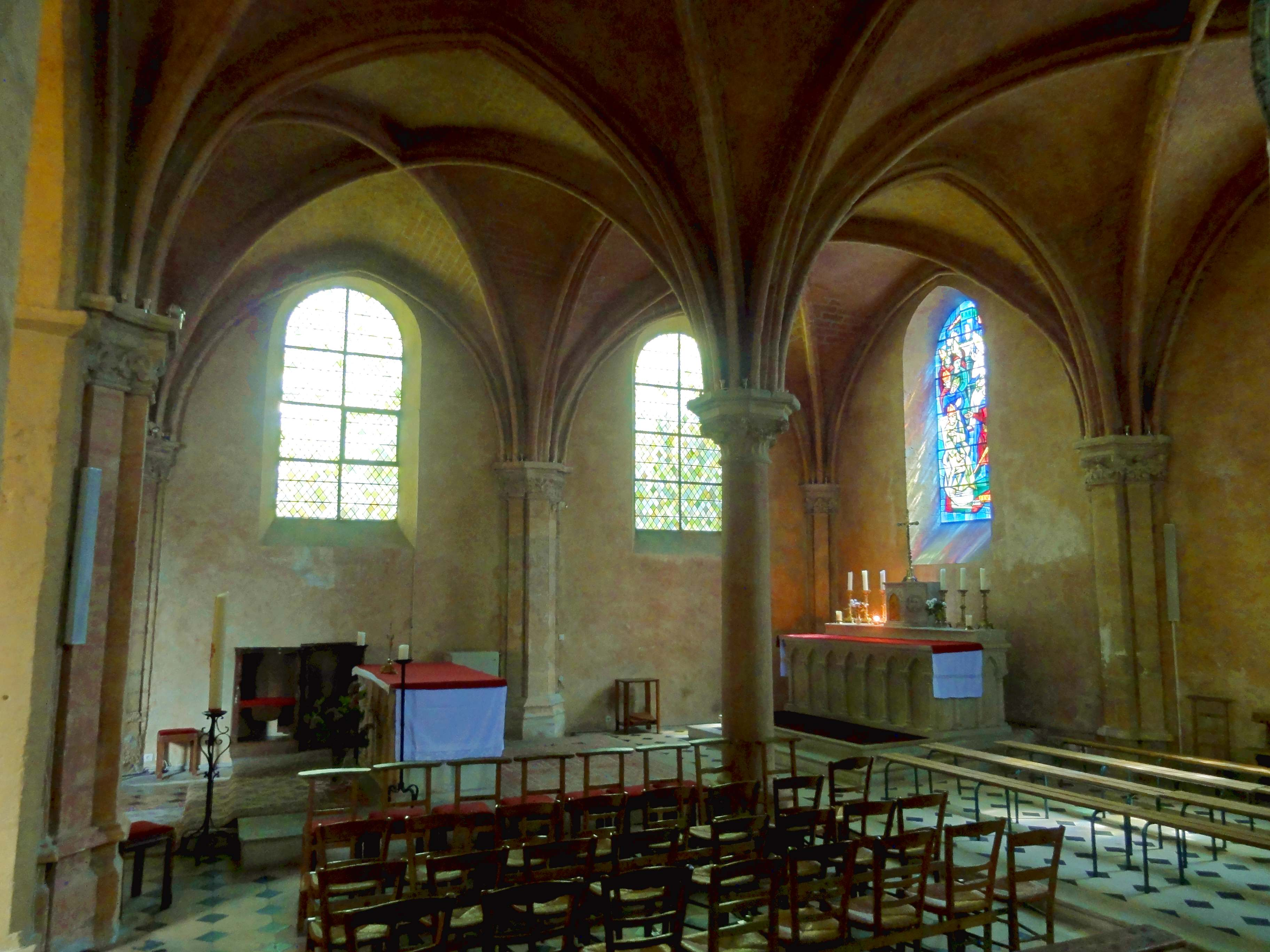 Intérieur de l'église - voir titre.